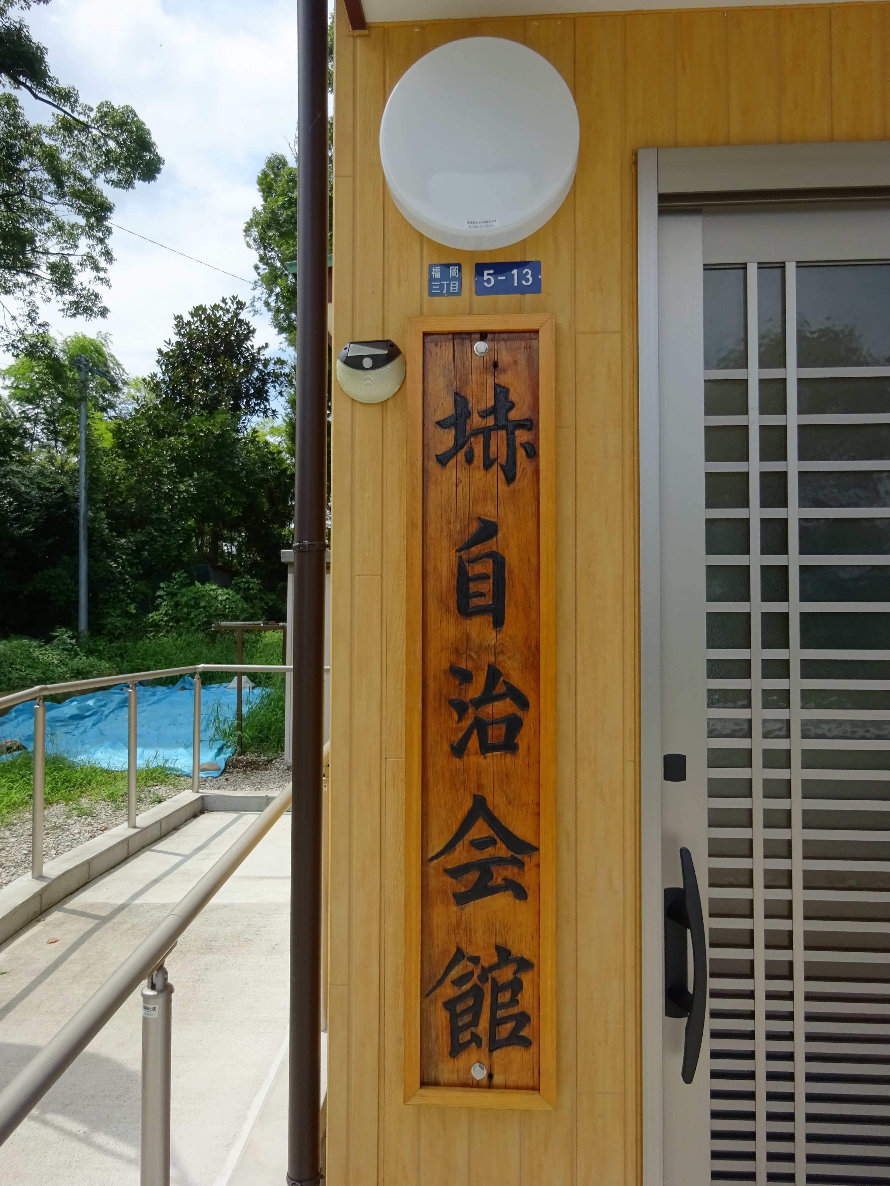 𡋽自治会館（埼玉県ふじみ野市福岡３丁目）